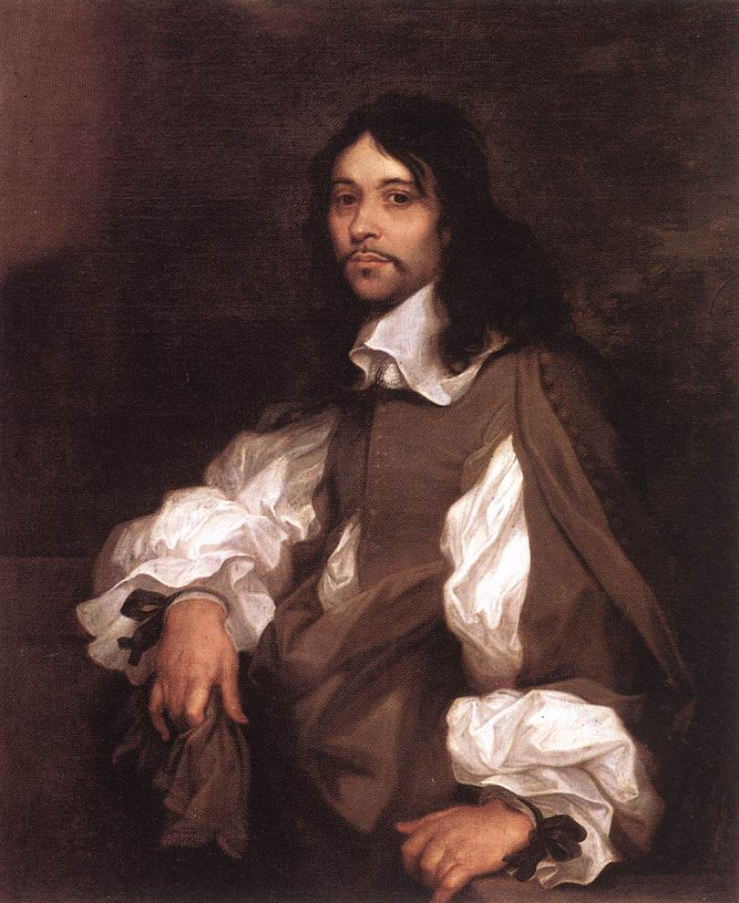 Portrait d’homme, dit l’homme aux rubans noirs Huile sur Toile, 108,5 x 89,5 cm